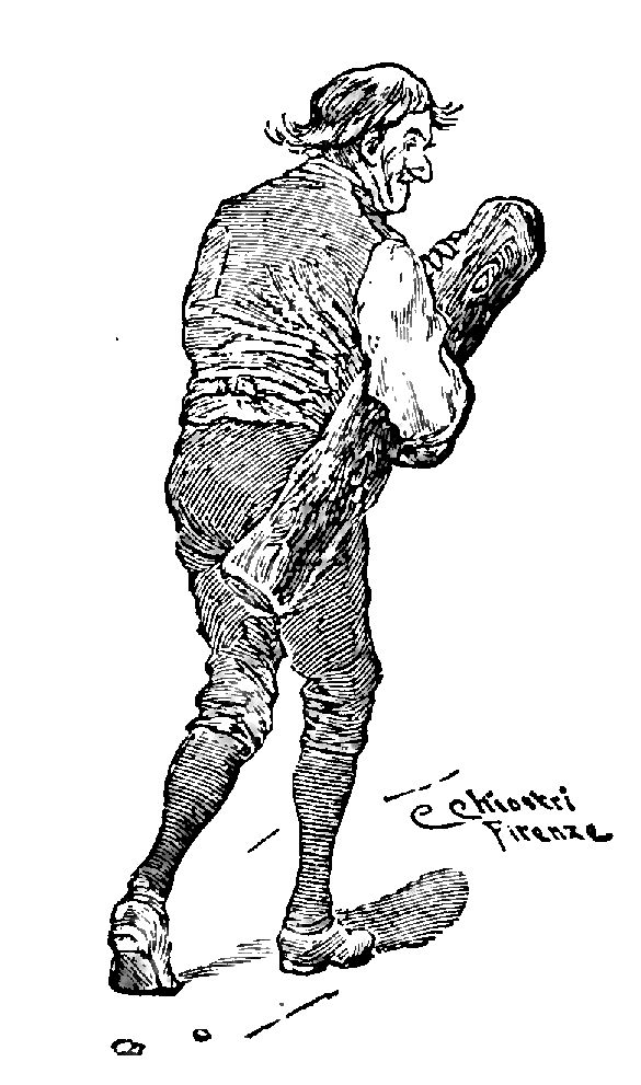 Illustrations from "Le avventure di Pinocchio, storia di un burattino", Carlo Collodi, Bemporad & figlio, Firenze 1902 (Drawings and engravings by Carlo Chiostri, and A. Bongini)